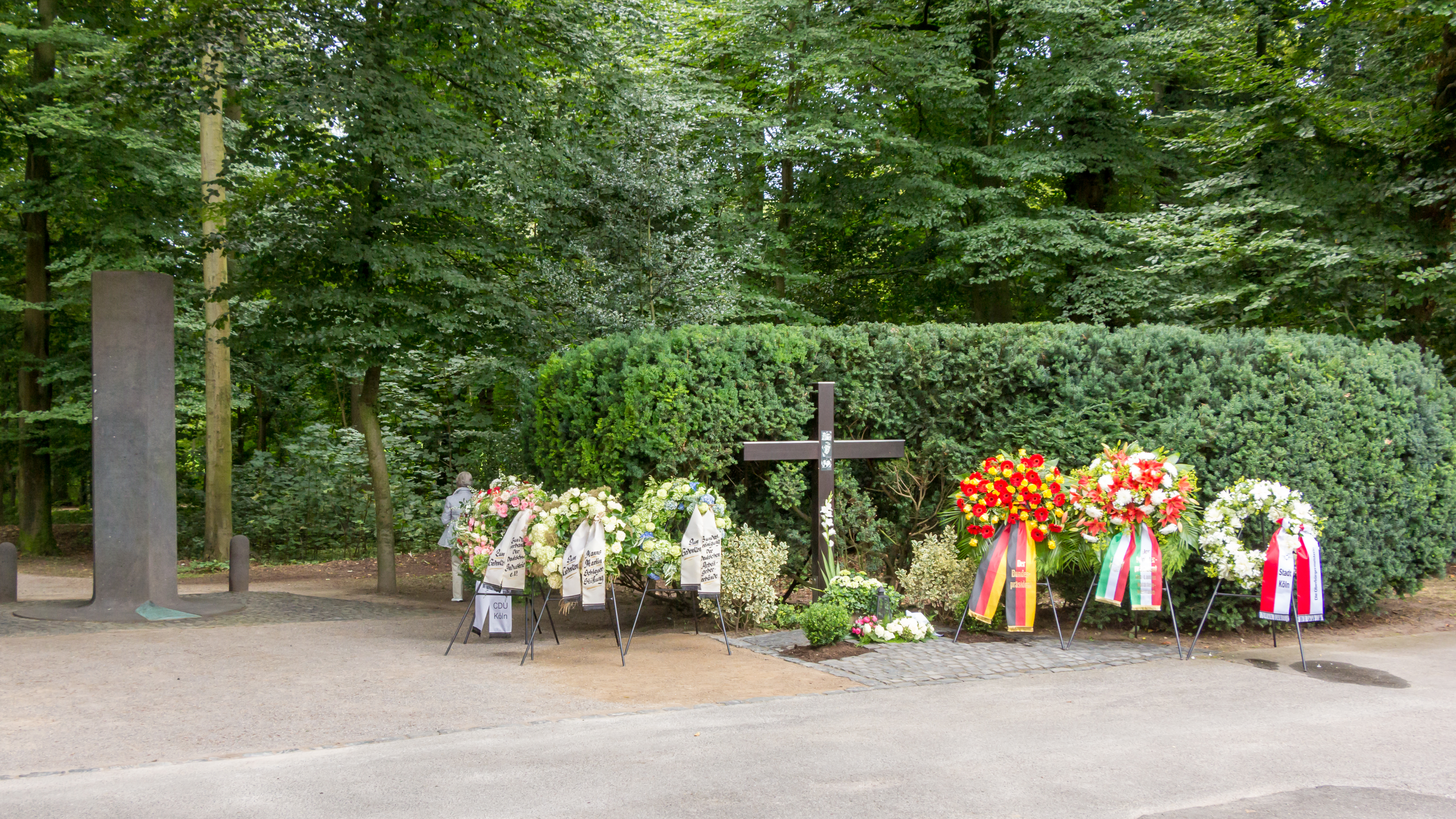 Kranzniederlegung 40. Jahrestag Attentat auf Hanns Martin Schleyer in der Köln-Braunsfelder Vincenz-Statz-Straße